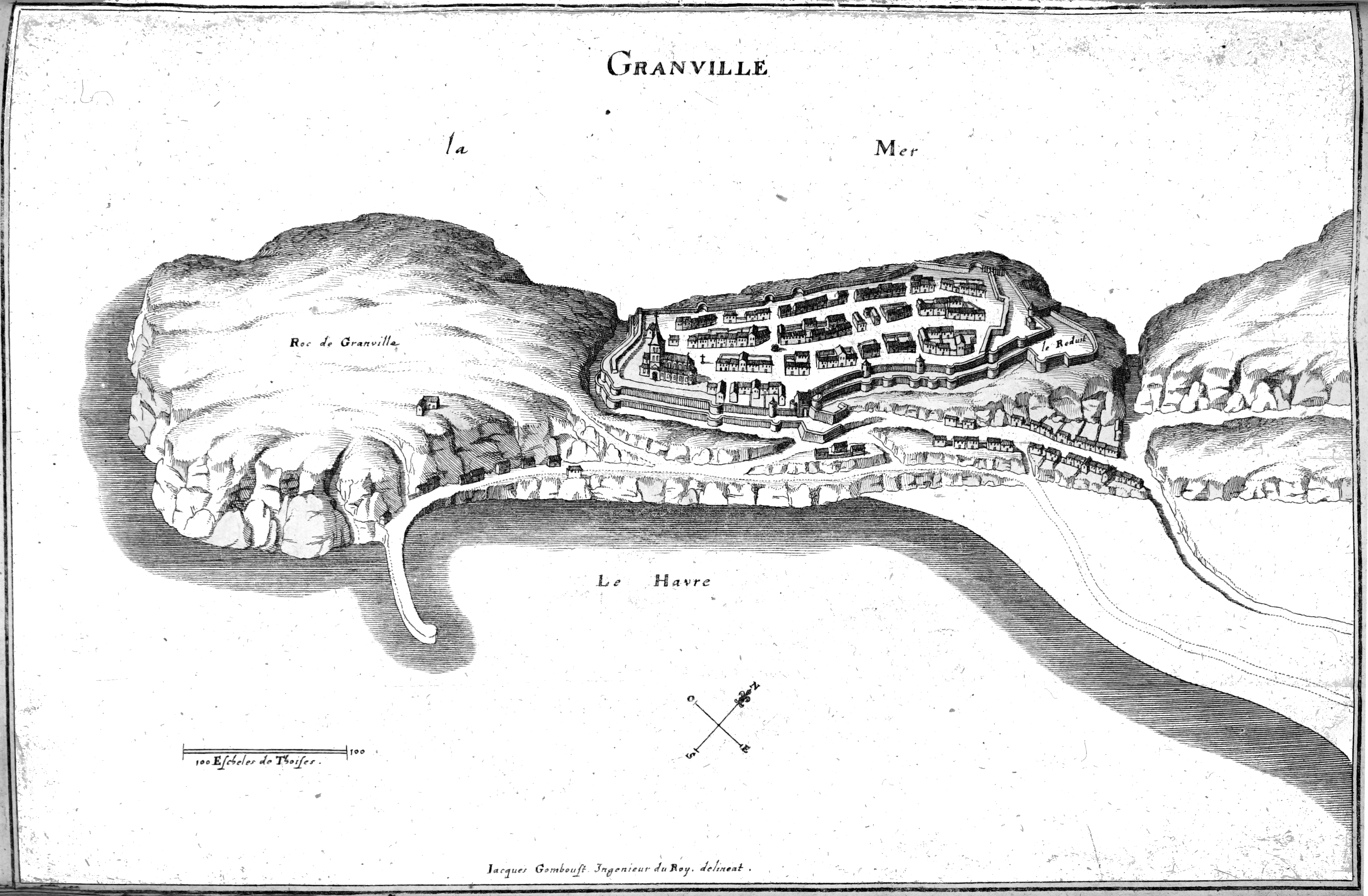 dessin provenant de "Topographia Galliæ".